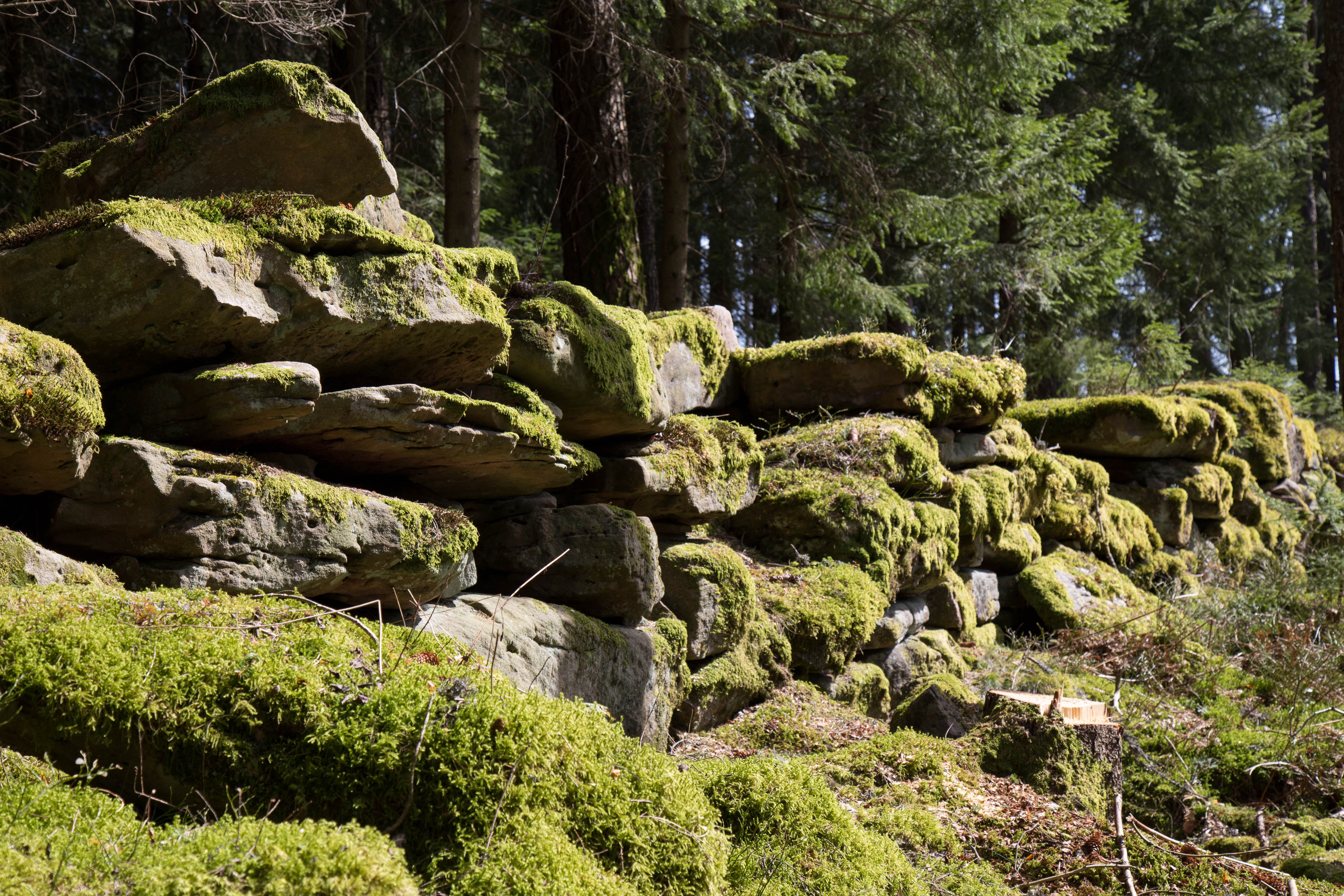 Rinkenmauer am Rinkenkopf bei Baiersbronn im Nordschwarzwald